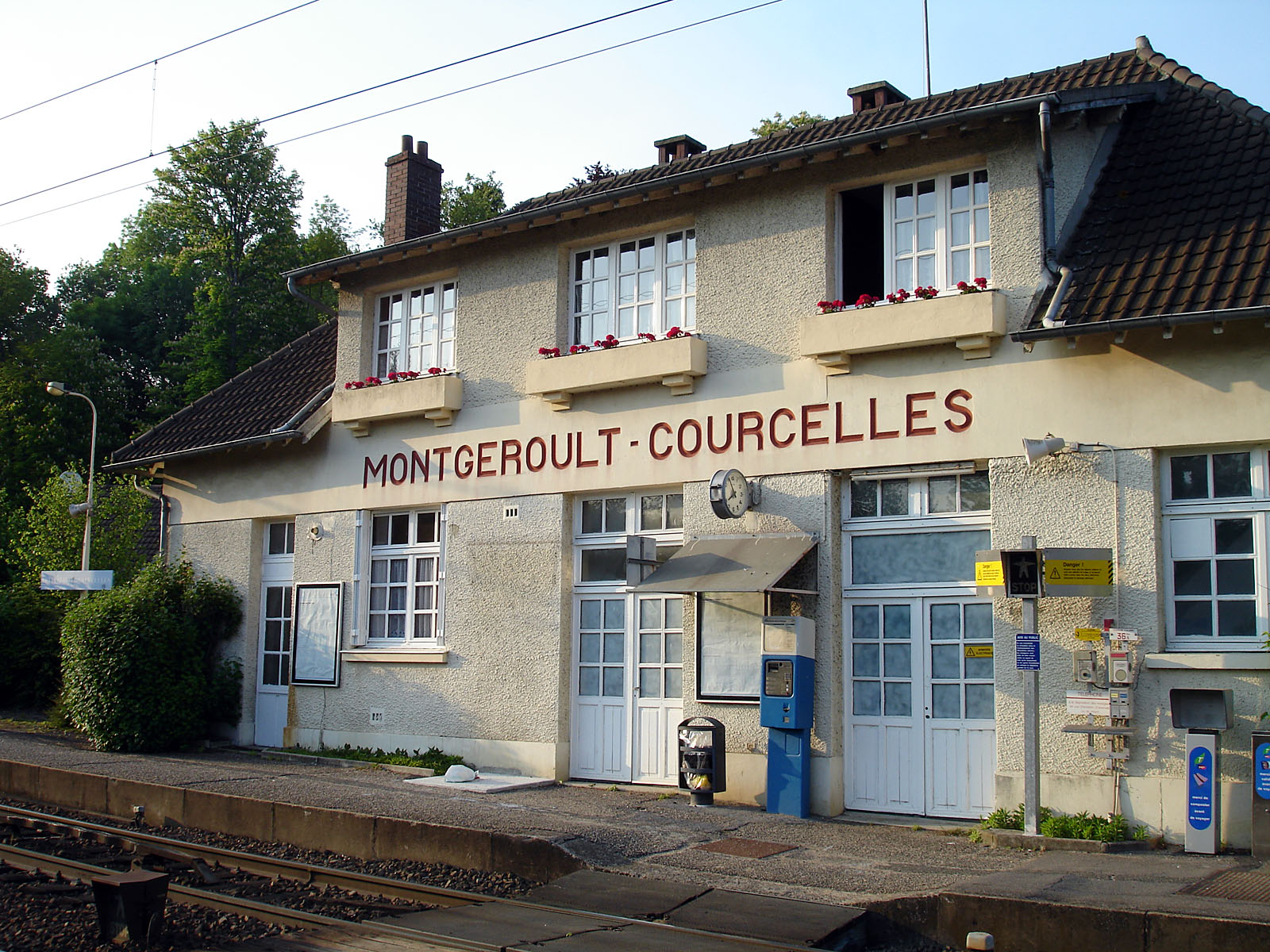 La gare de Montgeroult - Courcelles, Val-d'Oise, France.